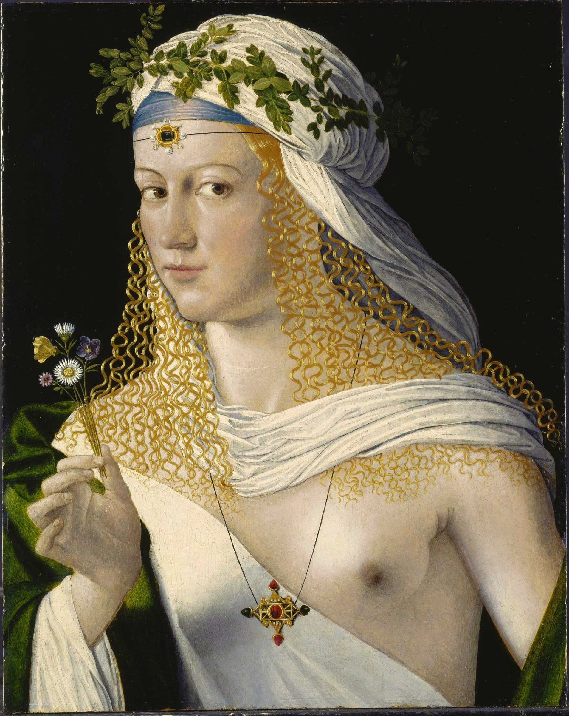 Traditionell gilt das Werk als Bildnis der Lucretia Borgia, Tochter von Papst Alexander VI.. Es zeigt eine unbekannte Dame in Gestalt der antiken Frühlingsgöttin Flora.